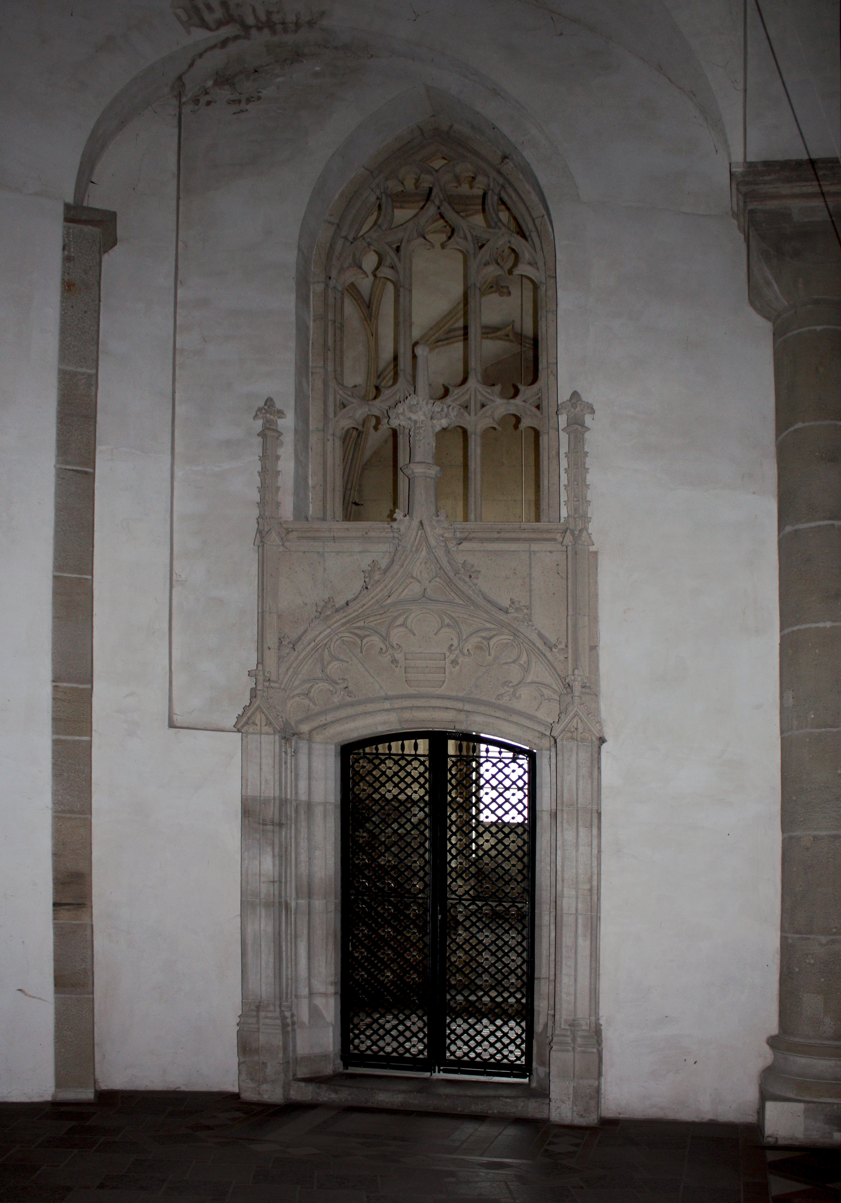 St. Maria im Kapitol, Köln. Stifterkapelle Hirtz 1493